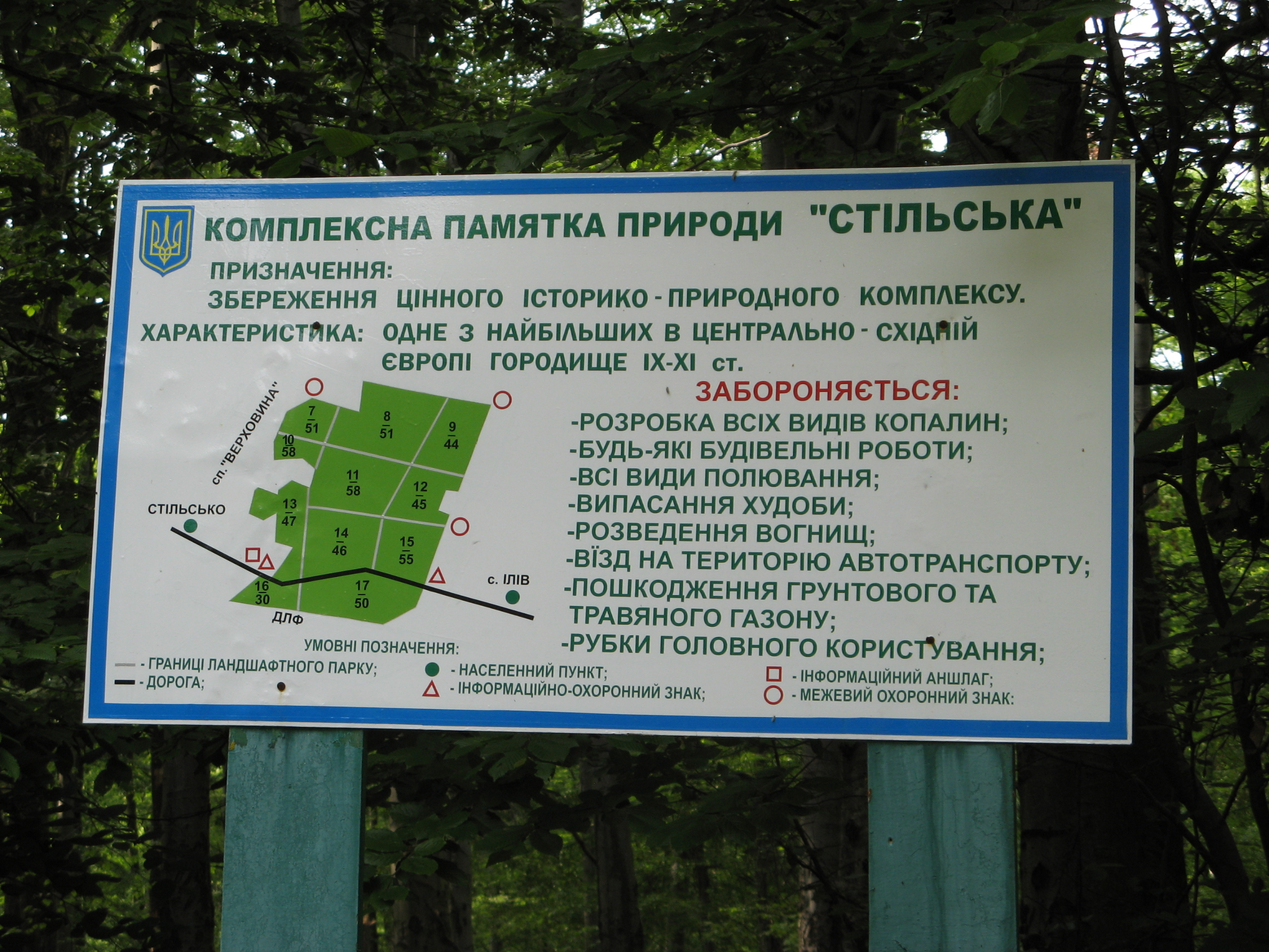 Стільсько (городище); Львівська обл., Миколаївський р-н.